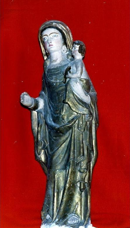 Laroque - Chapelle Saint-Jean - Vierge à l'enfant et à l'oiseau.